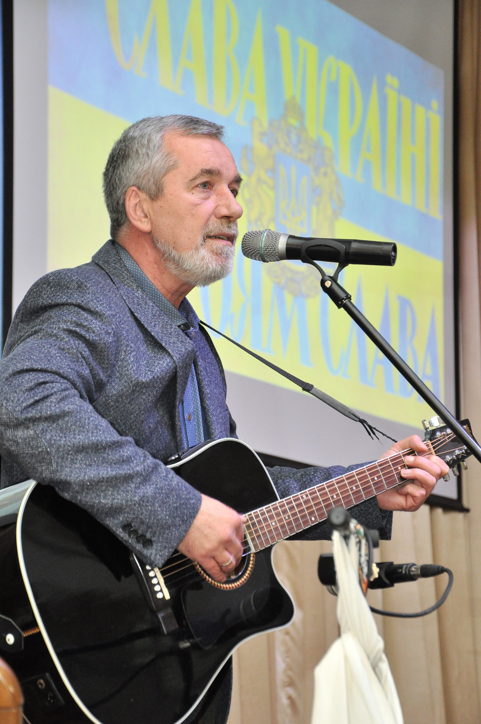 Український бард, поет, драматург Олександр Смик на церемонії нагородження орденом «За спасіння життя» в Тернопільському державному медичному університеті імені І. Я. Горбачевського 15 березня 2016 року.